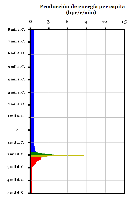 Era preindustrial, industrial y postindustrial según la teoría de Olduvai. En color azul la era preindustrial al comienzo de la revolución neolítica, en color verde los hechos consumados de la era industrial (1765-2009), en color amarillo las predicciones de la teoría hasta el fin de la civilización industrial (2100) y en color rojo la era postindustrial. En el artículo "The Olduvai Theory:Sliding Towards a Post-Industrial Stone Age" (Duncan, 1996) se menciona que en la gráfica existente al respecto no debe ser tomado al pie de la letra tanto el eje vertical como el horizontal. En la realización de esta gráfica se muestra confiable la proporcionalidad de la escala temporal (eje vertical). Por otro lado, con respecto a los datos de energía per cápita (eje horizontal), los datos de la era industrial están tomados de los datos mencionados en el artículo "The Olduvai Theory: Toward Re-Equalizing the World Standard of Livin" (Duncan, 2009), los de la eras pre y postindustrial están basados en la gráfica del artículo ya mencionado (Duncan, 1996) bajo la reserva de que no pueden ser confiables en su eje horizontal. Sin embargo, diversos autores difieren demasiado en cuanto a estimaciones de la utilización de energía per cápita de la era preindustrial desde el neolítico: de 12.000-27.000 Kcal/c/día (3-7 bep/c/año) según Earl Cook (Cook, 1971); de 6.000-7.500 Kcal/c/día (1,5-1,8 bep/c/año) según Paolo Malanina (Malanina, 2009); otros autores hasta 2.5x1010 Kcal/mundial/día (0,125-0,625 bep/c/año entre Mesopotamia, Egipto, India, Incas, China, Mesoamérica y el resto del mundo).